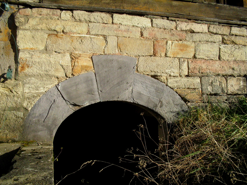 Tannerie Kalpers (Malmedy) : entrée de cave entourée de schiste ardoisier.